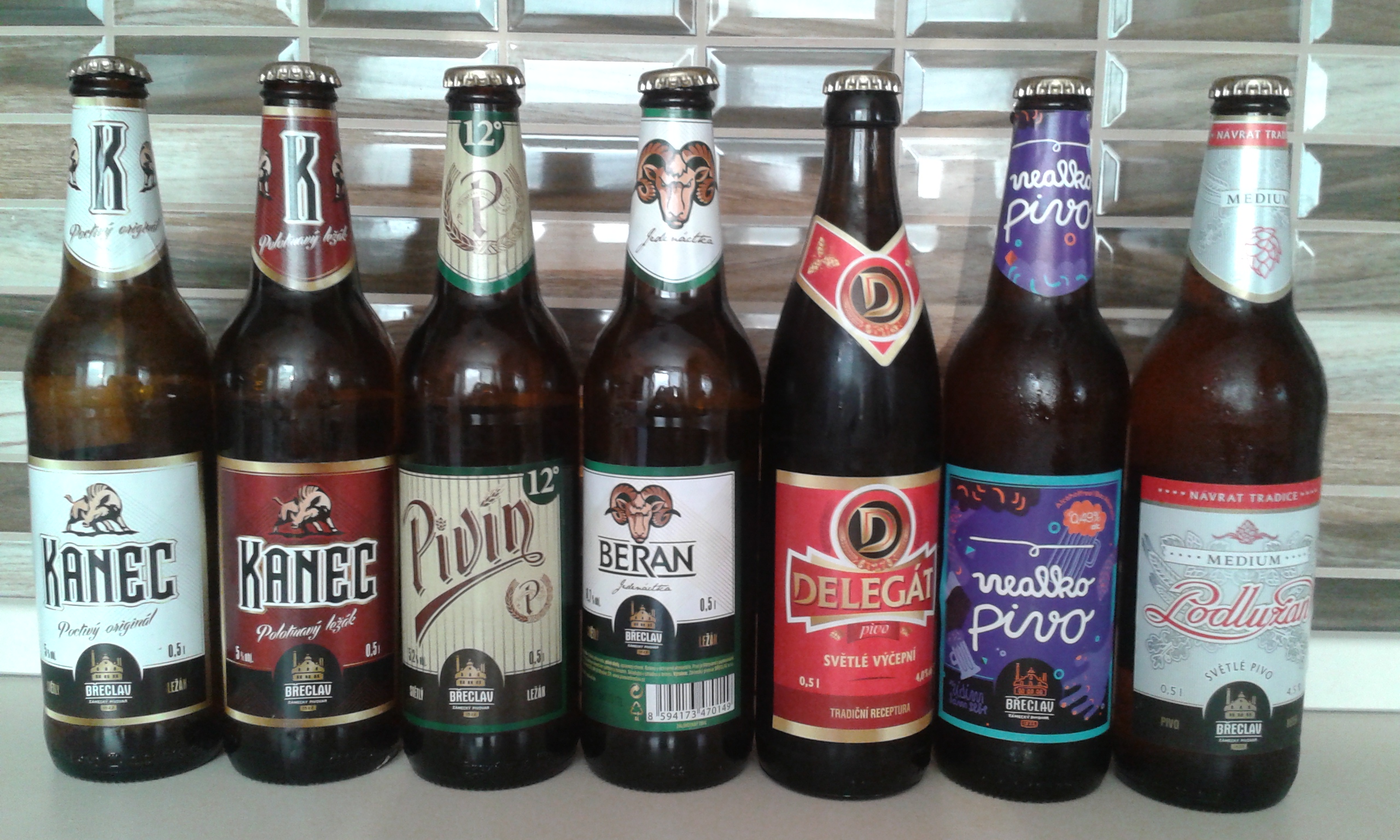 Zámecký pivovar Břeclav – vybraný sortiment piv